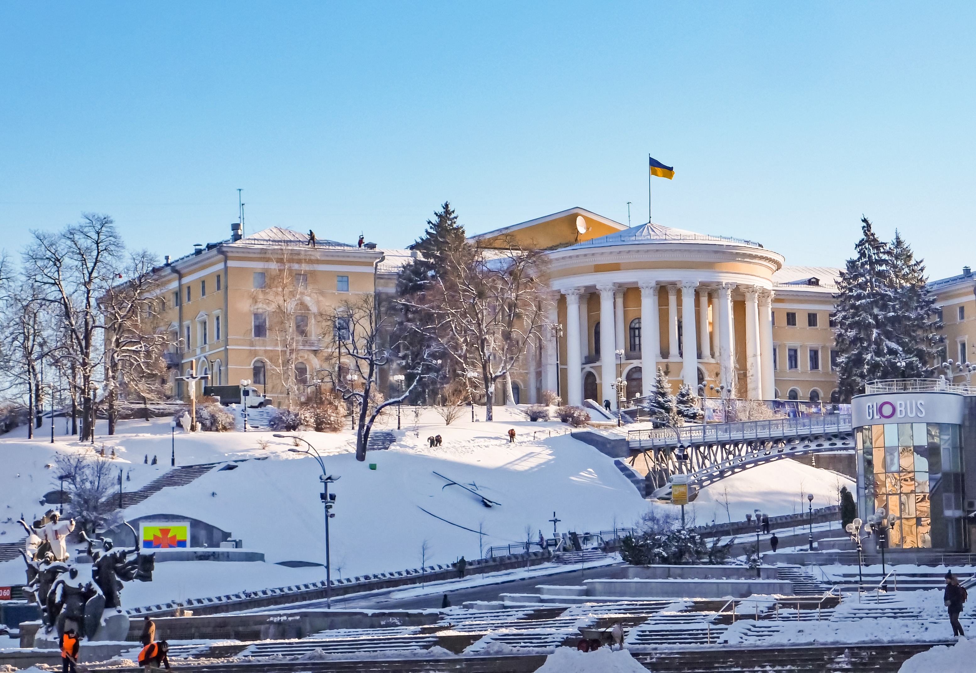 Будівля Інституту шляхетних дівчат (:uk:Жовтневий палац культури), в якому викладали у 1865–1904 роках М. В. Лисенко, композитор та відомі особи; у 1934–1941 роках містилося управління НКВС, де судили і розстрілювали жертв сталінського режиму, Київ, Героїв Небесної Сотні алея, 1